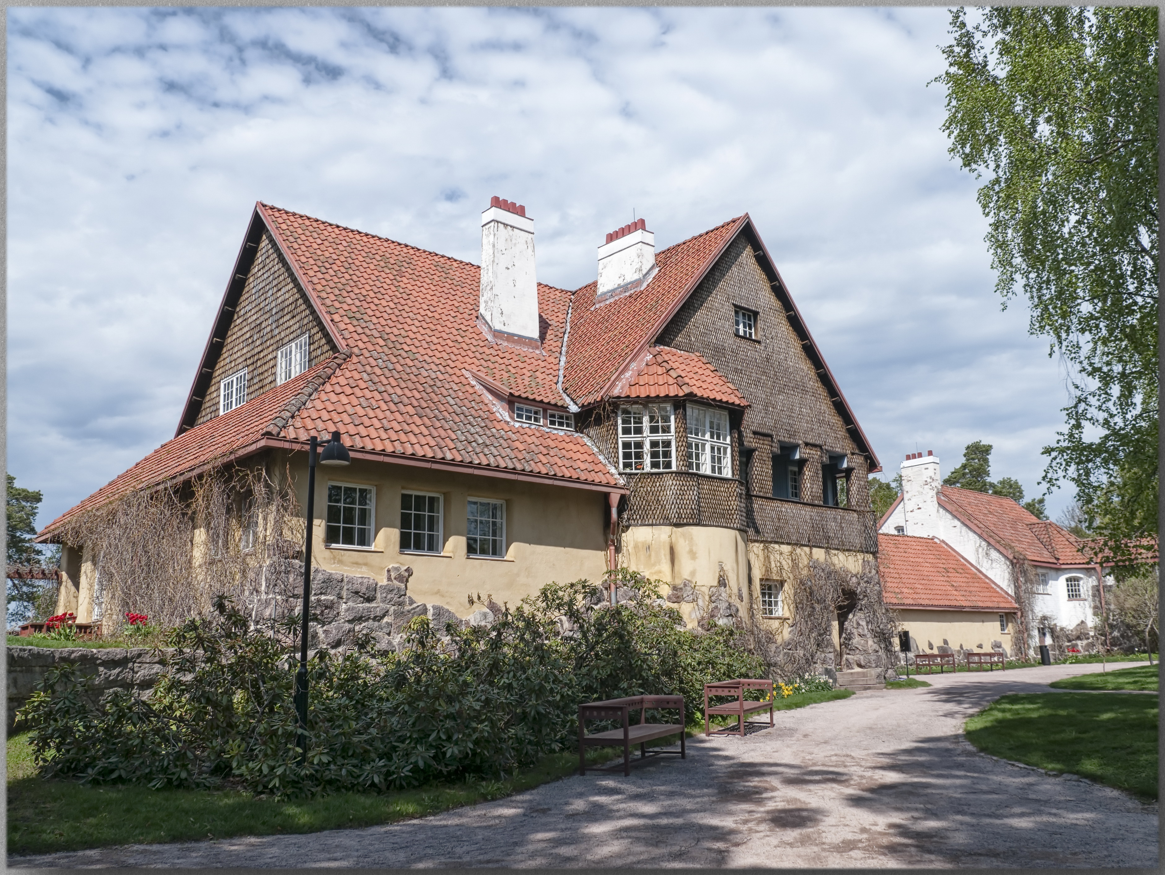 Hvitträsk; taiteilijakoti ja kulttuuriympäristö Kirkkonummella